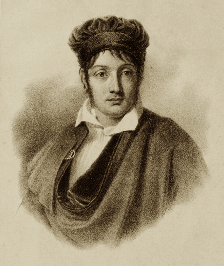 Portrait of Charles Boulanger de Boisfrémont